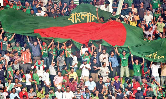 Bangladesh cricket team Supporters